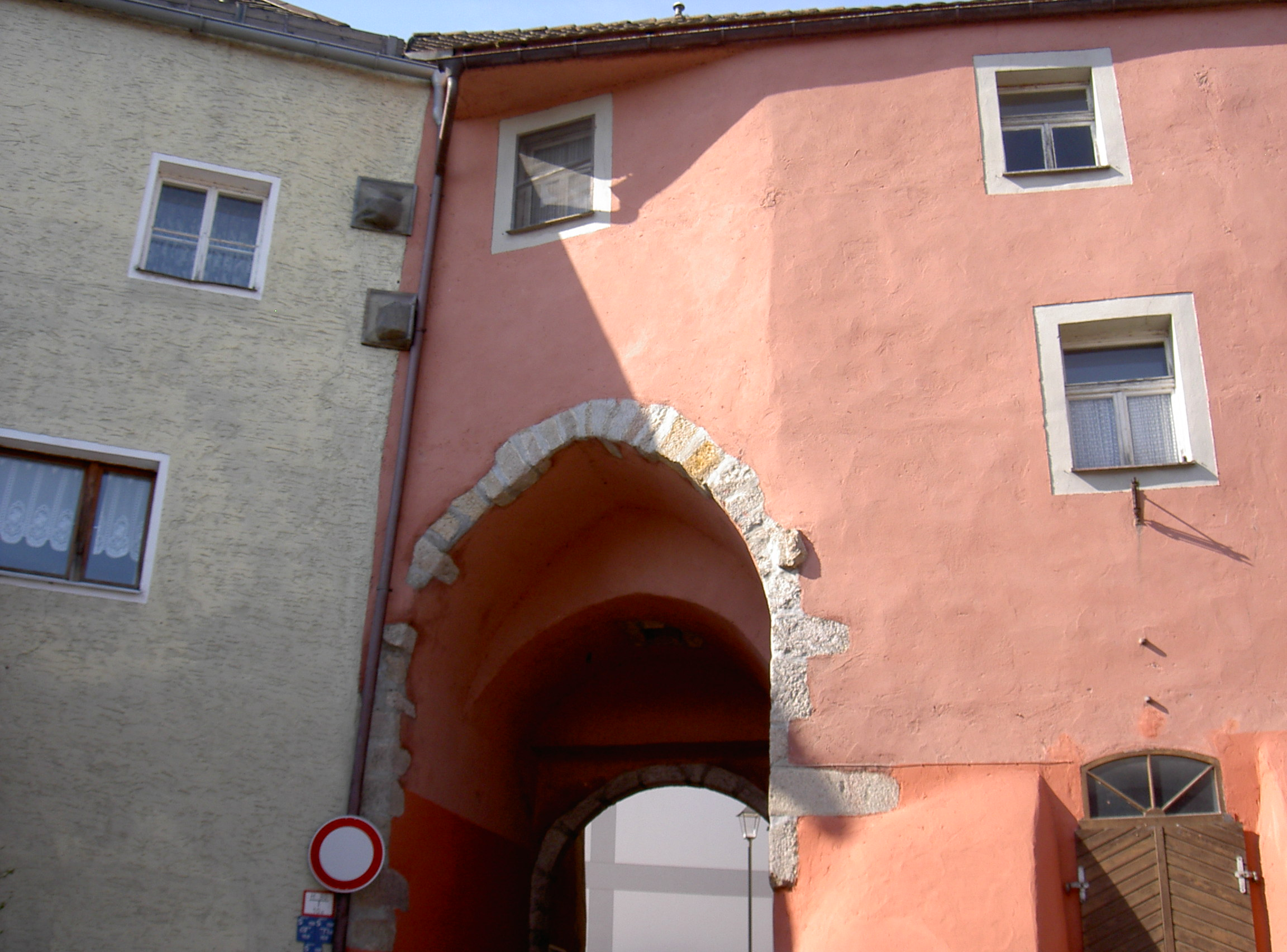 Neunburg vorm Wald, Im Berg 2, Burgtor, frühes 15. Jahrhundert